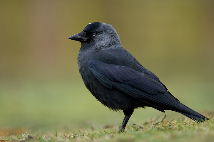 Corvus monedula